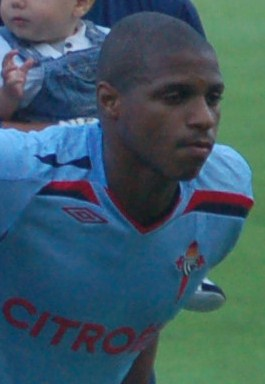 Vasco Fernandes, no 2009 xogando co RC Celta de Vigo o trofeo Cidade de Pontevedra.